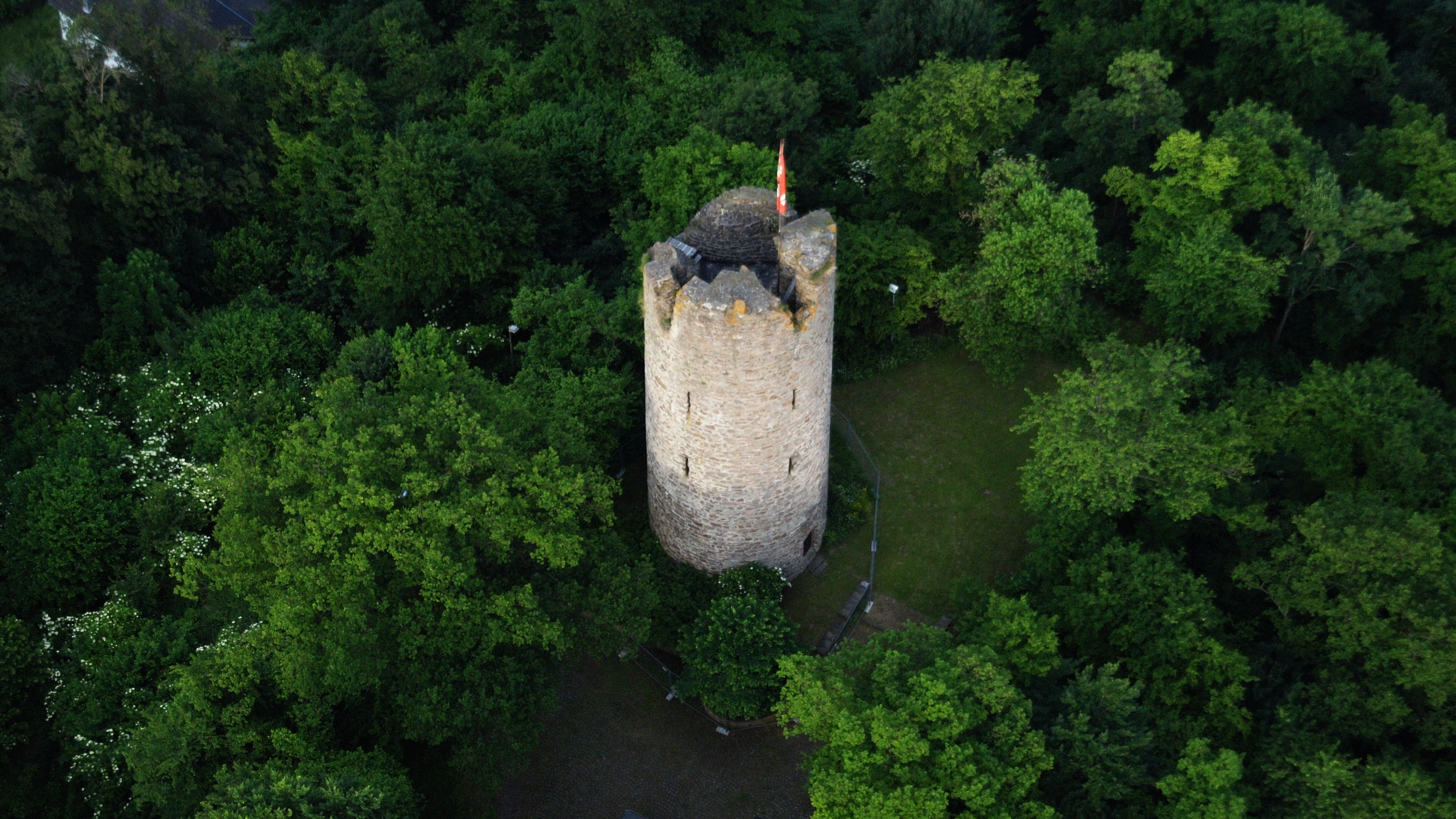 Der Turm in Burglahr aus der Vogelperspektive